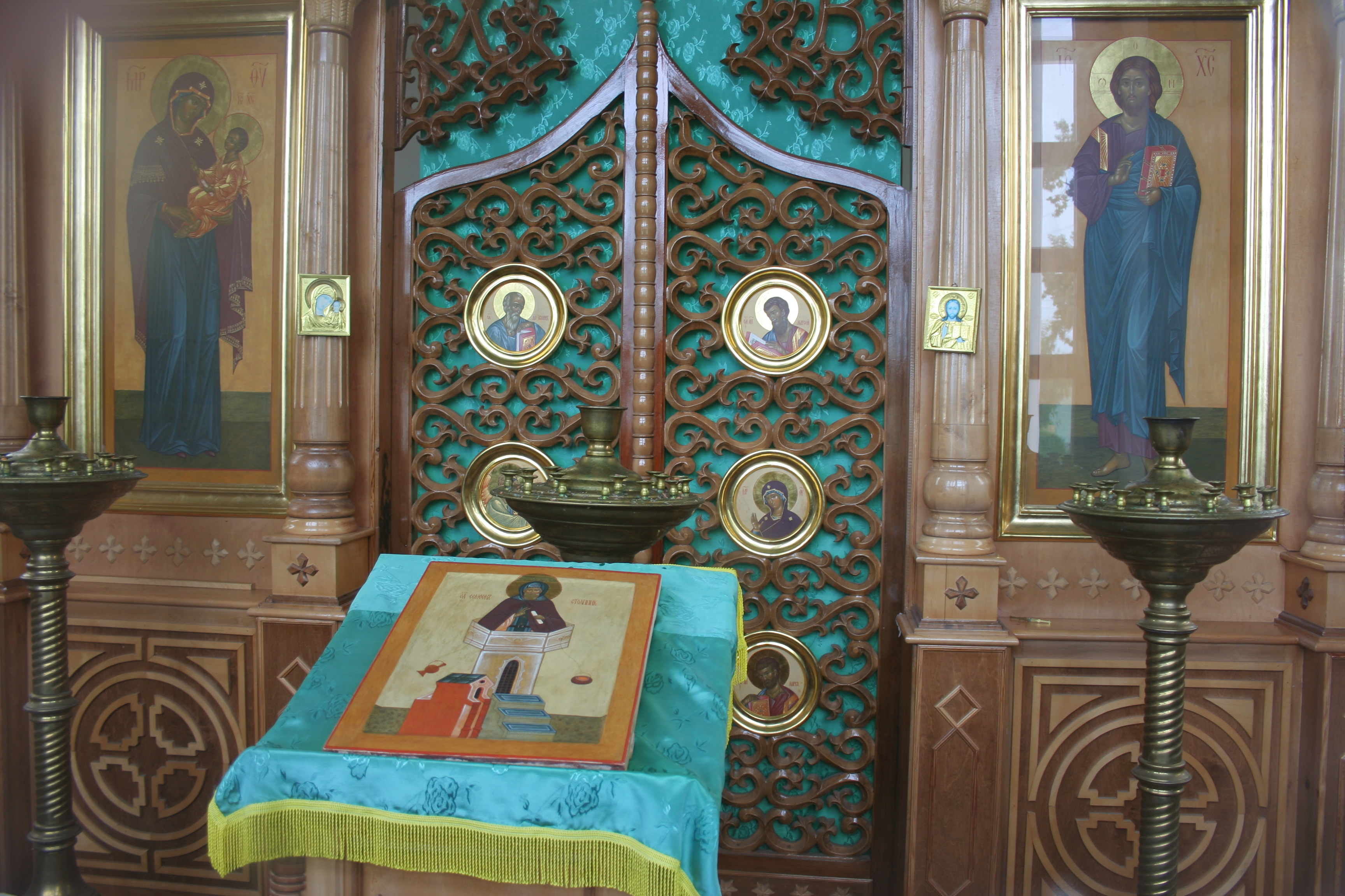 Kaplica św. Symeona Słupnika w Orli.